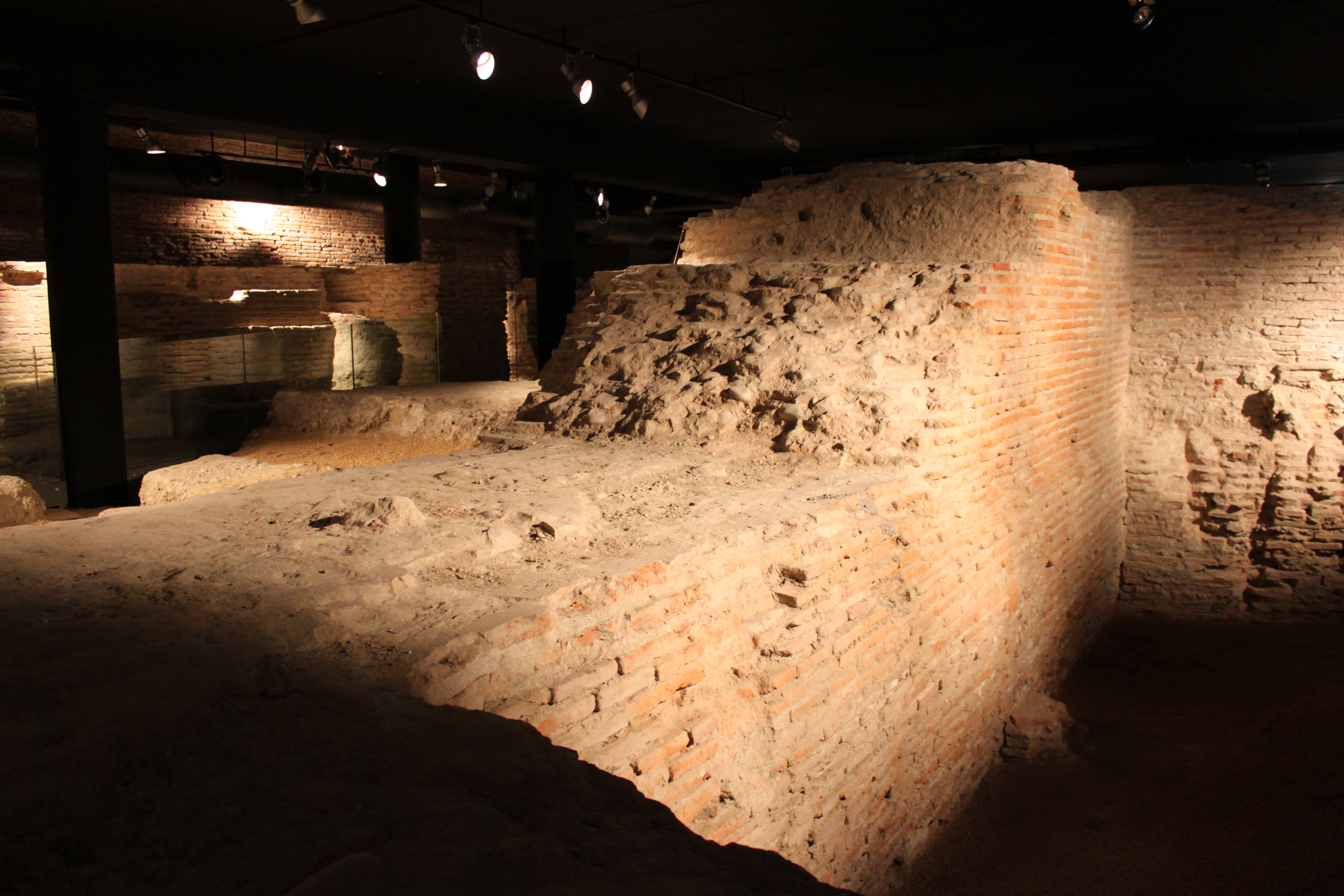 Vestiges du château narbonnais sous le palais de justice, Toulouse, France